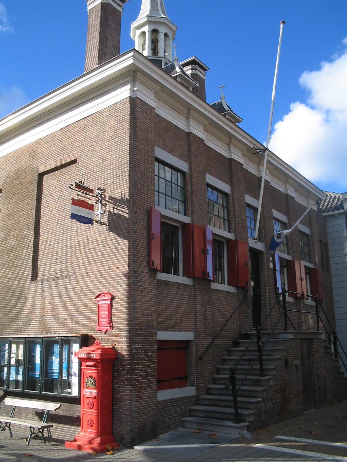 Oude raadhuis, Maassluis